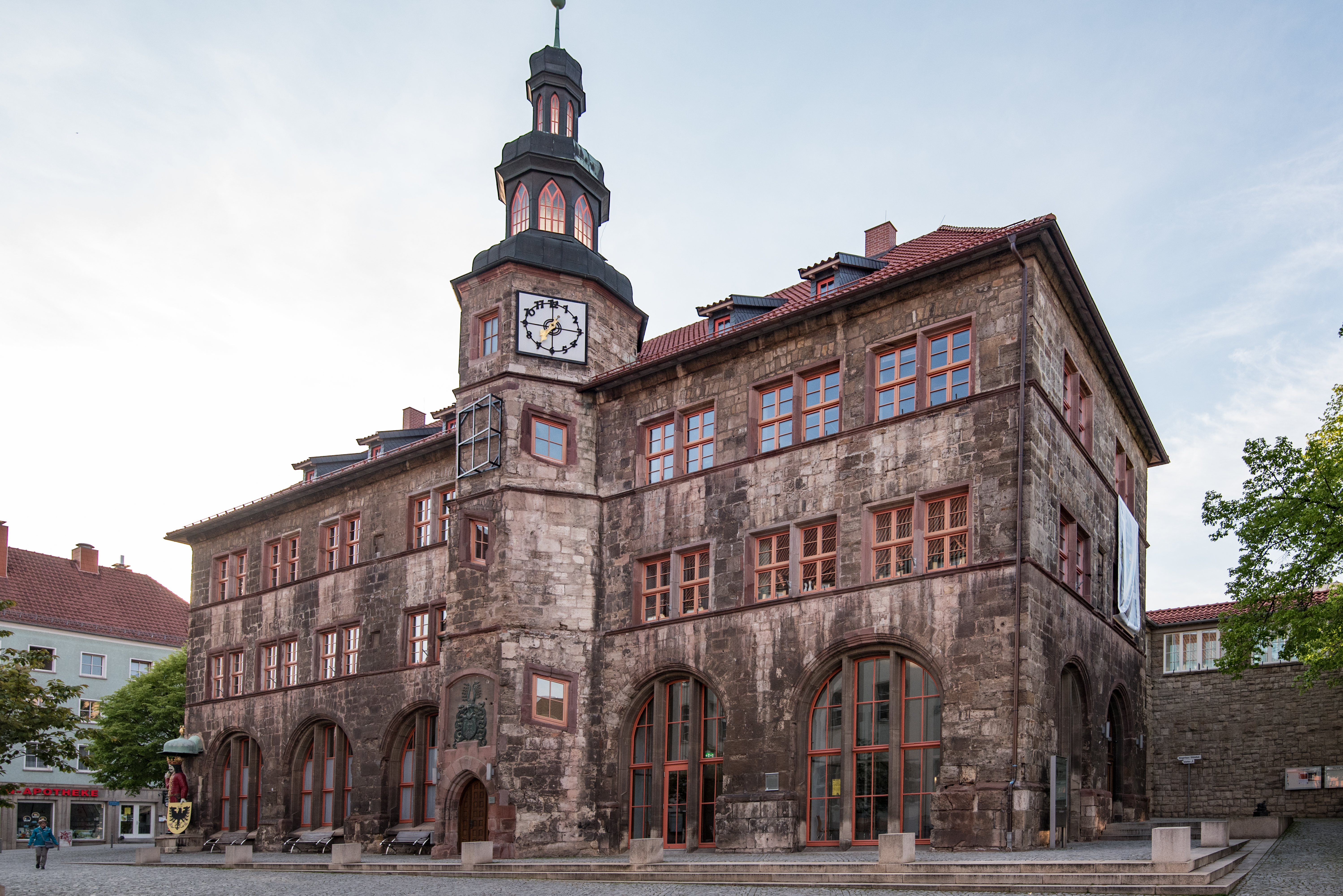 Nordhausen, Markt 1